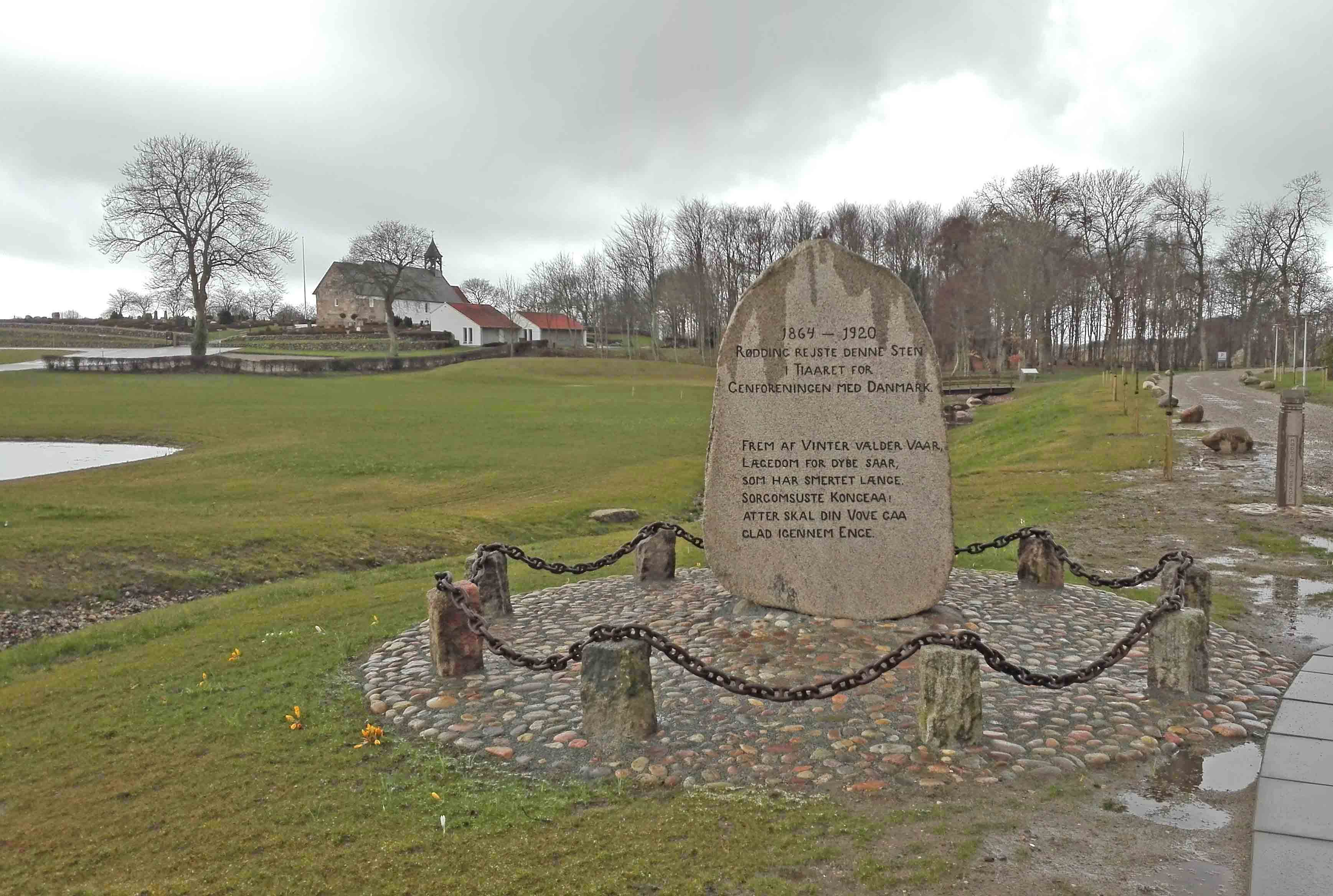 Genforeningssten med Rødding Kirke i baggrunden